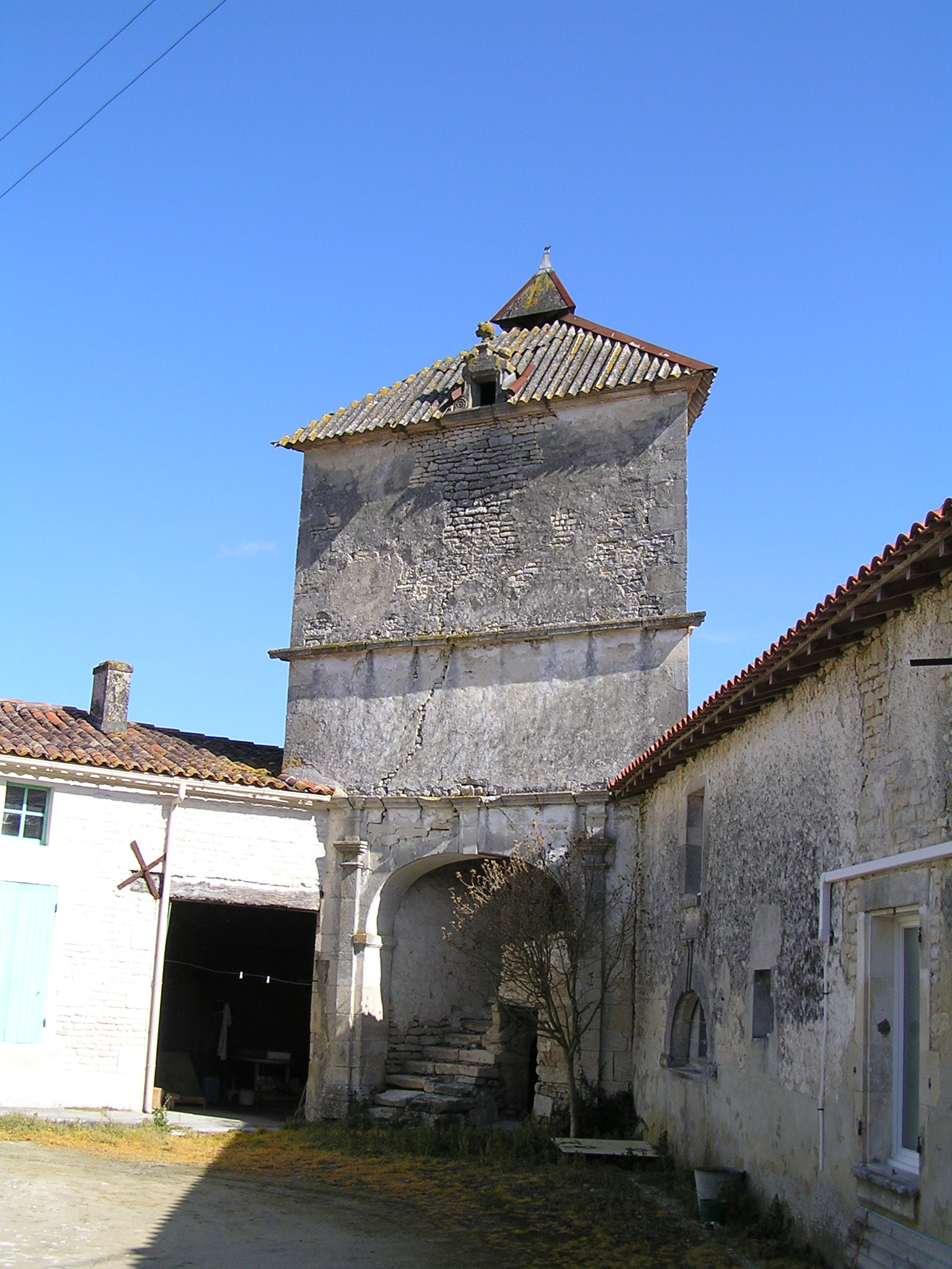 très rare pigeonnier triangulaire à Fresneau commune de Haimps